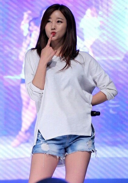 160527 레인보우(Rainbow) 제16회 생거진천 농다리축제 직캠 승아